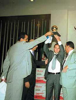 DjamelBelmadi BallonD'or 2001 Algérien El Haddaf